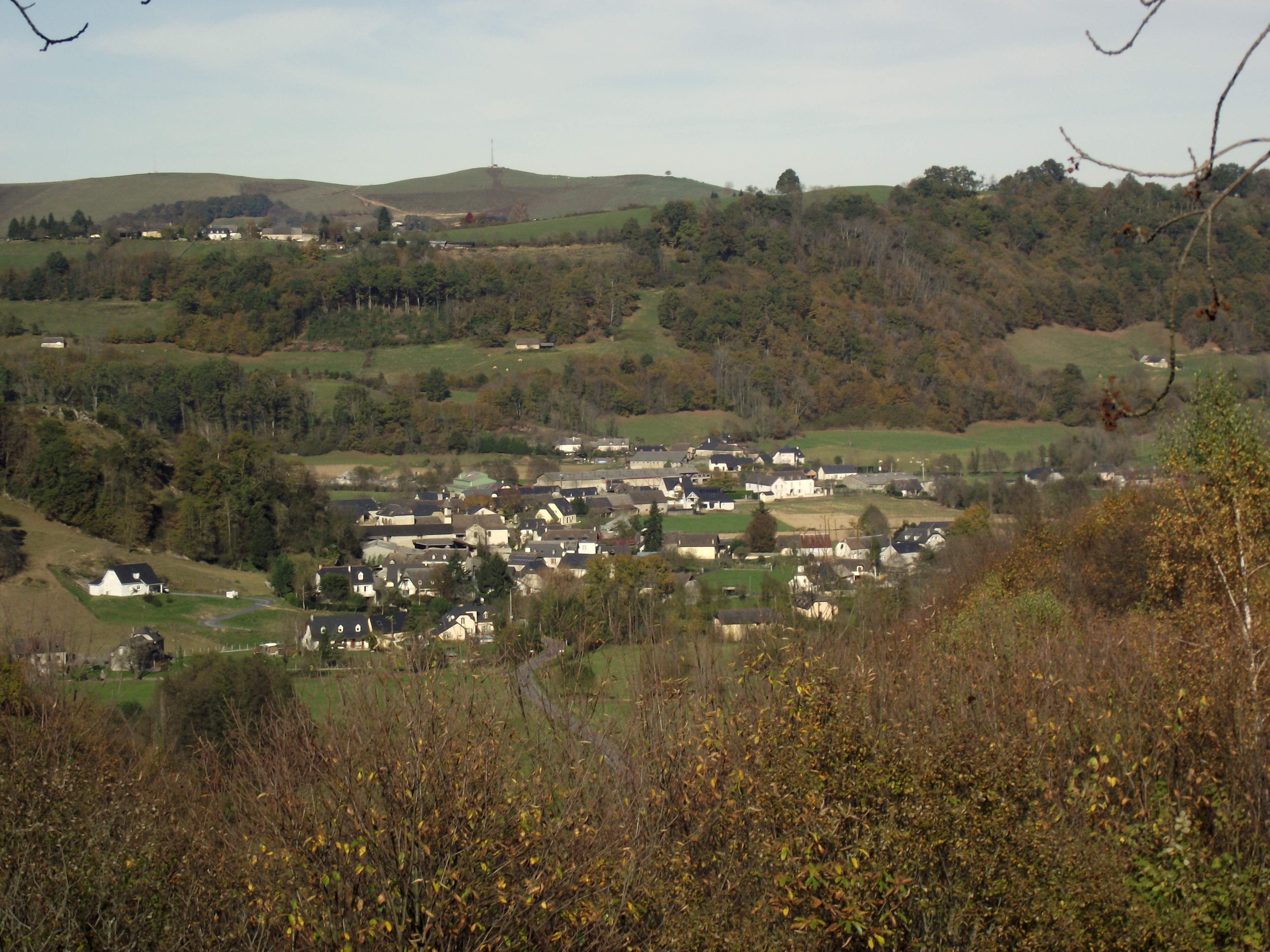 Arcizac-ez-Angles vu des Angles (Hautes-Pyrénées, France) au premier plan, hameau de Recahorts (commune de Bourréac) au 2ème plan, ligne du Miramont (commune de Julos) à l'arrière plan.